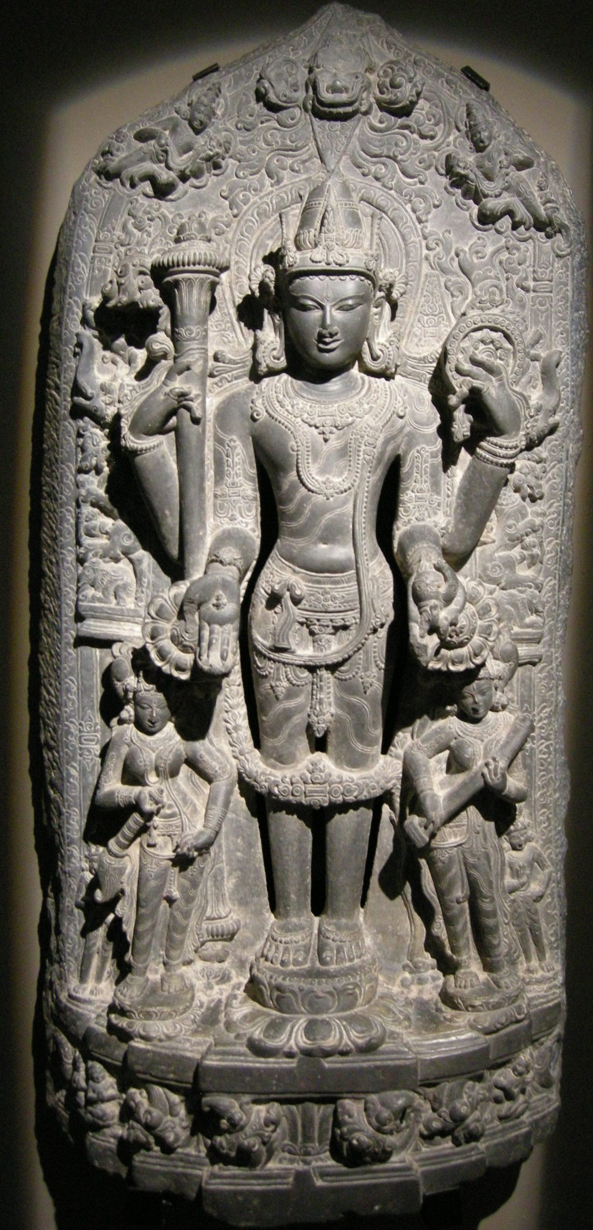 India nord-orientale, vishnu vasudeva, xii sec